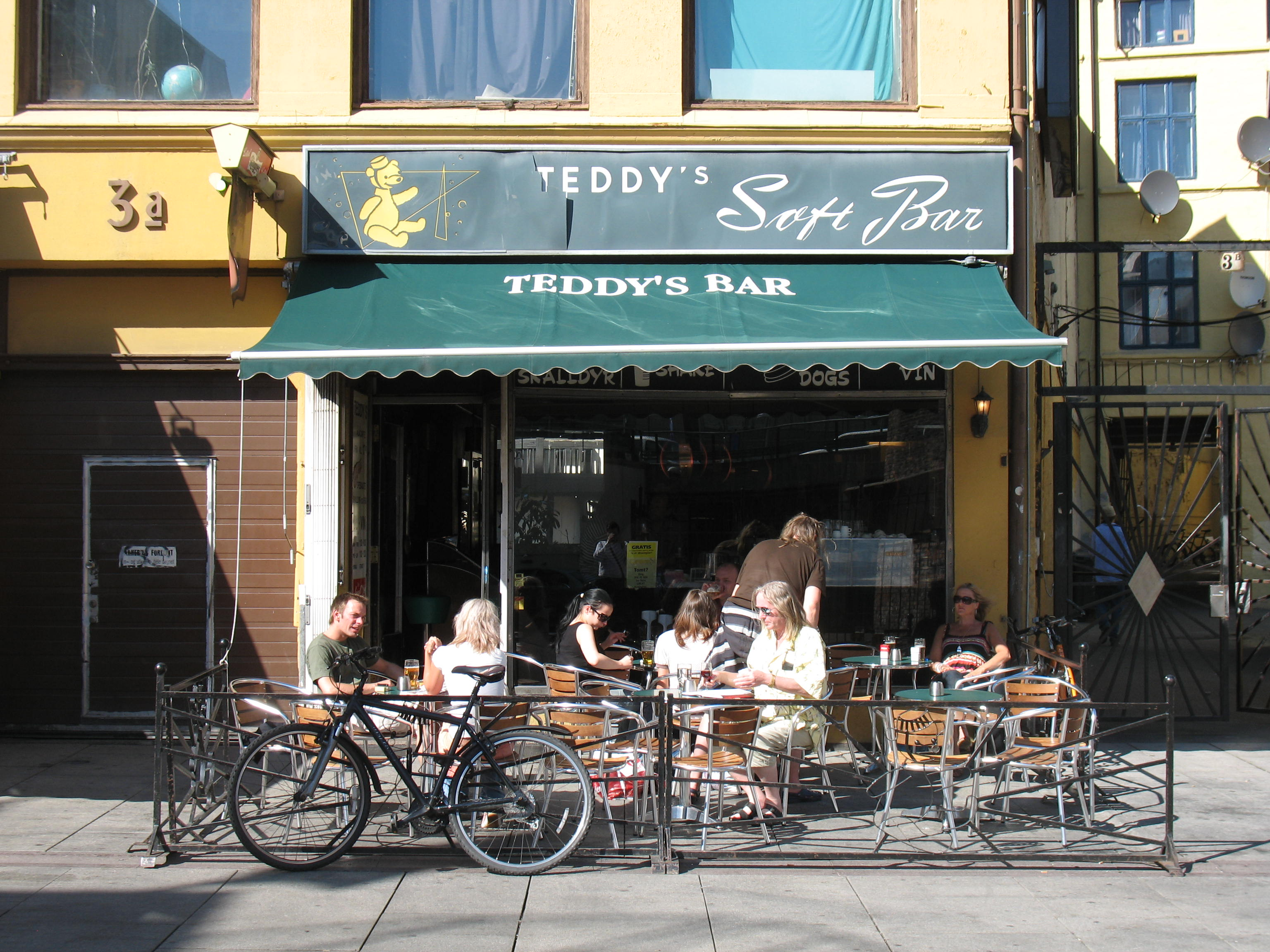 Teddy's Soft Bar i Oslo.